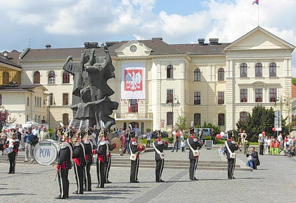 Ratusz w Bydgoszczy, dawny budynek kolegium jezuickiego (1648 r.)